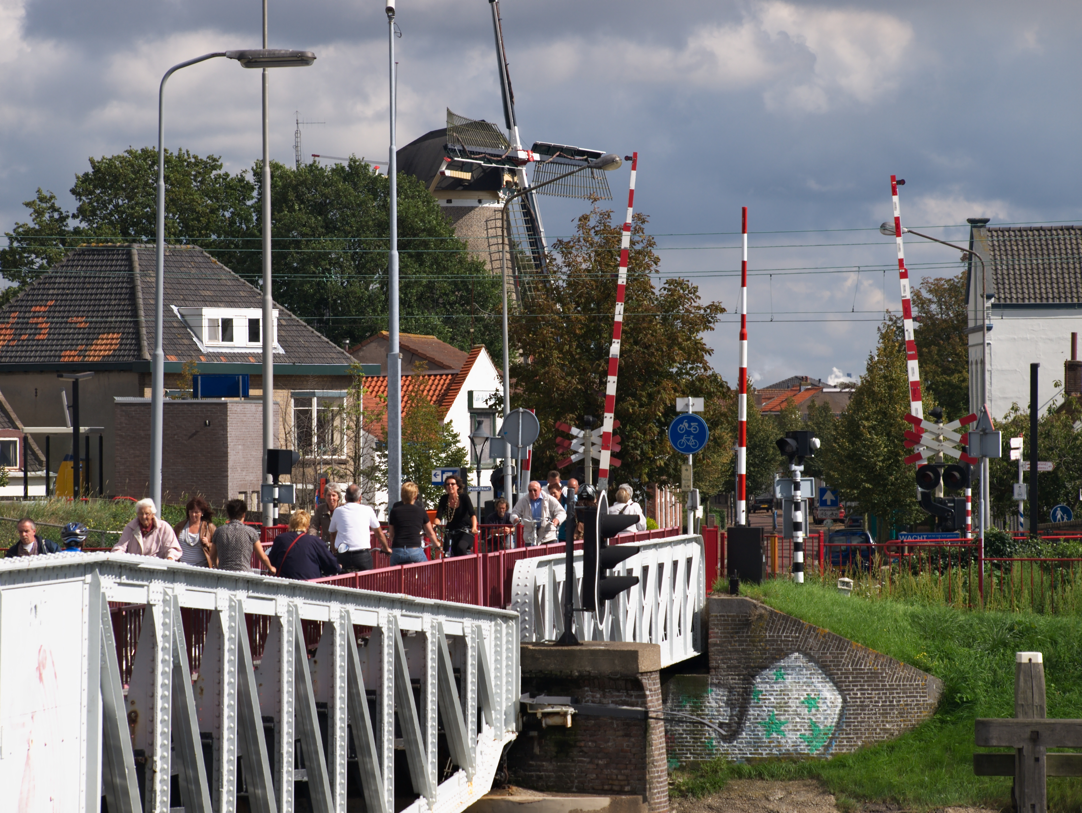 Rijksmonumenten